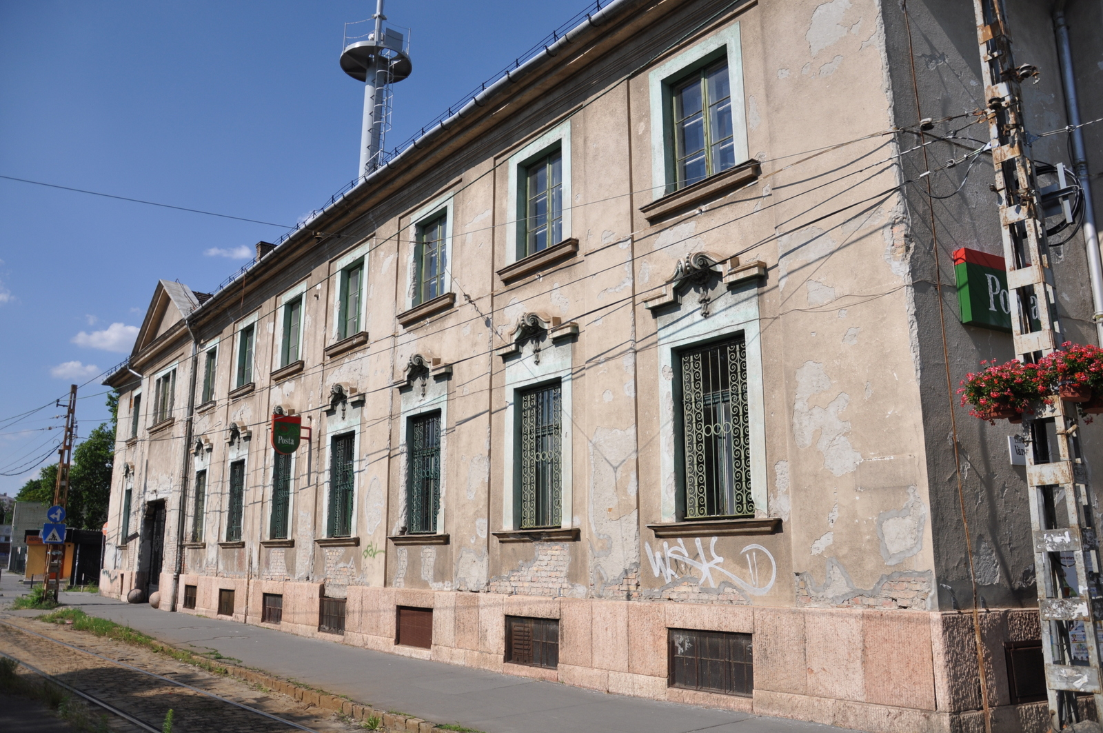 A posta épülete Budafokon, a Savoyai Jenő téren